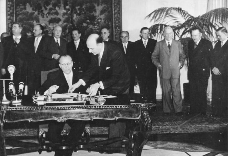 Zentralbild/prasa 15.5.1955 Vertragsunterzeichnung in Warschau Auf der 4.Plenarsitzung der Warschauer Konferenz zur Gewährleistung des Friedens und der Sicherheit in Eruopa, stimmten am 14. Mai 1955 alle Regierungsdelegationen dem Warschauer Vertrag über Freundschaft, Zusammenarbeit und gegenseitigen Beistand zu. Noch am gleichen Tage wurde der Vertrag von den Vertretern der acht Staaten unterzeichnet. UBz: Ministerpräsident Otto Grotewohl unterschreibt für die Deutsche Demokratische Republik.